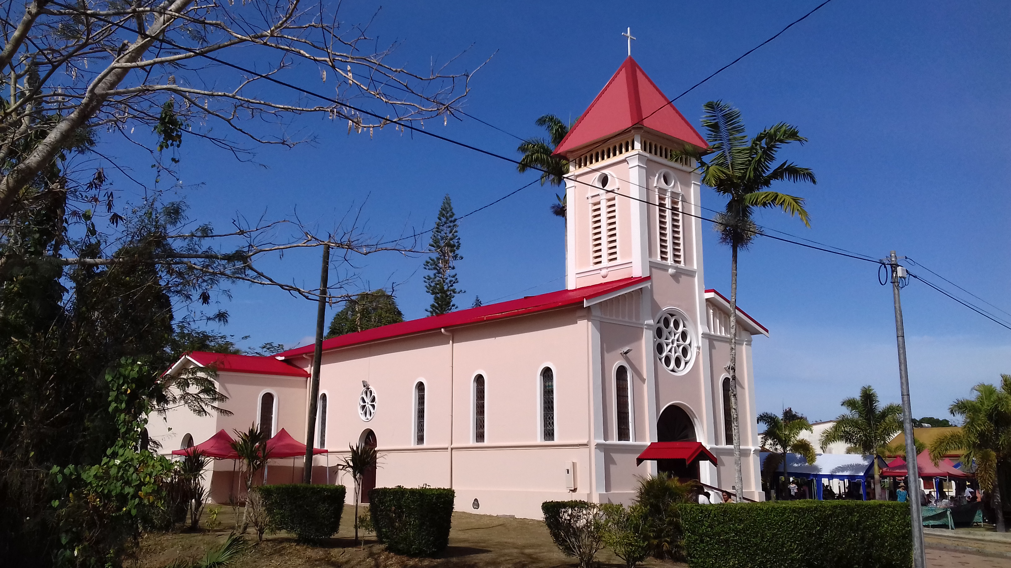 Eglise de La Foa, un dimanche après la messe